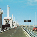 voorbeeld gif dithering, eigen foto, eigen werk.